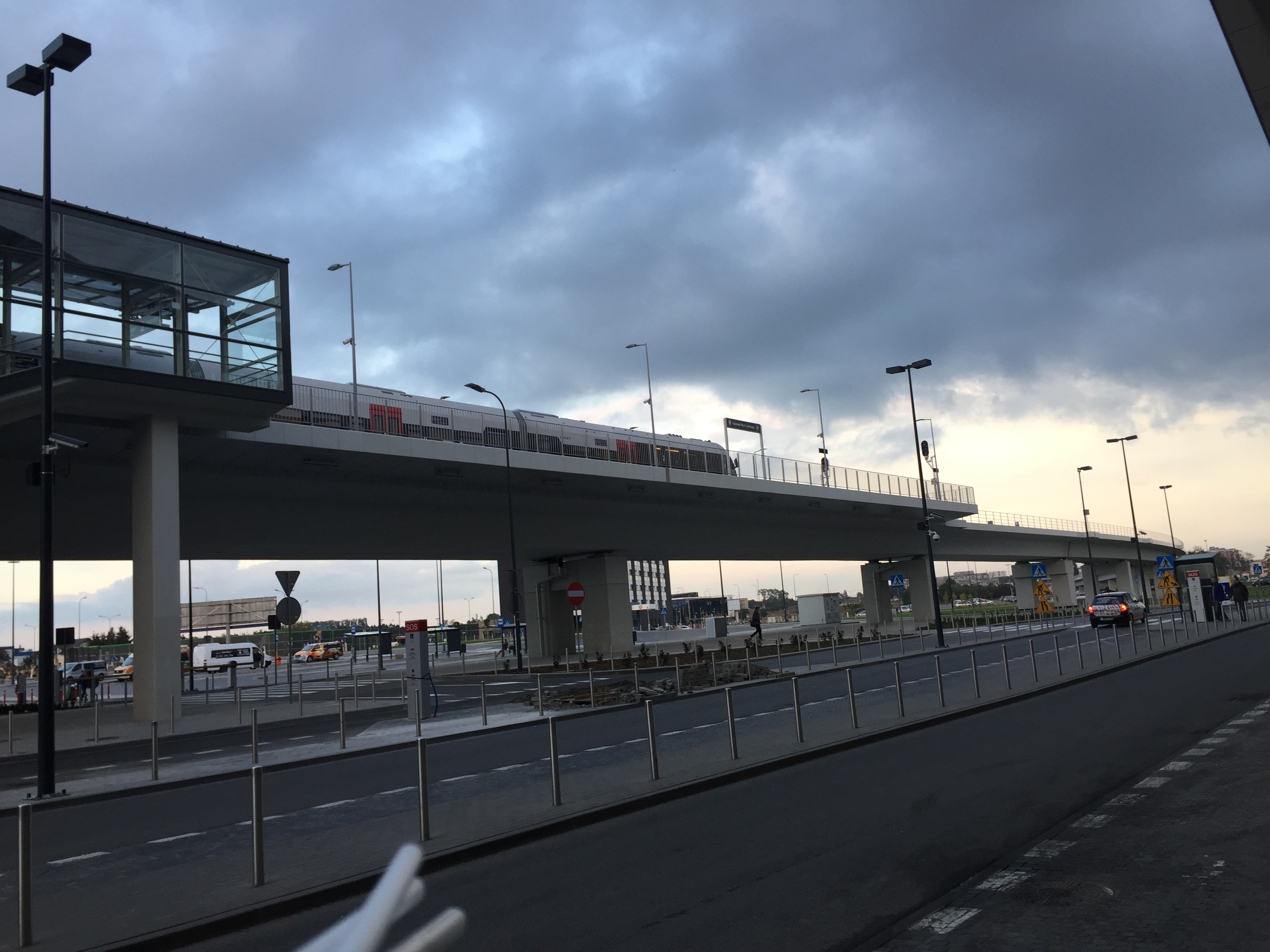 PKM Gdańsk Port Lotniczy This photo was taken during Railway Wikiexpedition 2015 set up by Wikimedia Polska Association in cooperation with Fundacja Grupy PKP.You can see all photographs in category Wikiekspedycja kolejowa 2015.